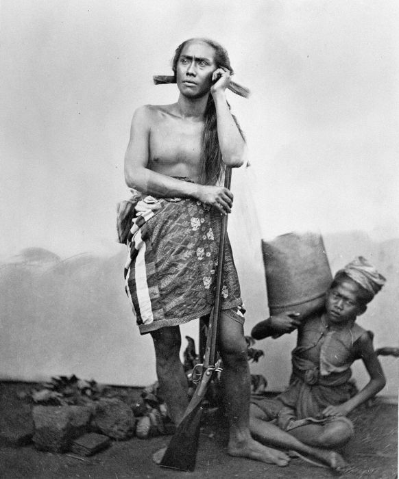 Foto. Gusti Ngurah Ktut Jelantik*, raja Buleleng, bersiap-siap untuk berburu. *Catatan:tidak sama dengan I Gusti Ktut Jelantik, pahlawan nasional, yang wafat 1849 dalam Puputan Jagaraga